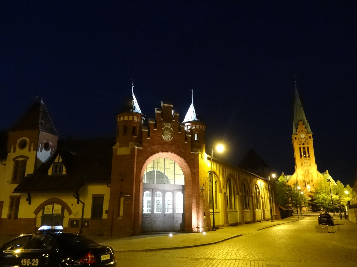 Miejska hala targowa w Bydgoszczy przy ul. Podwale bud. 1906 r.